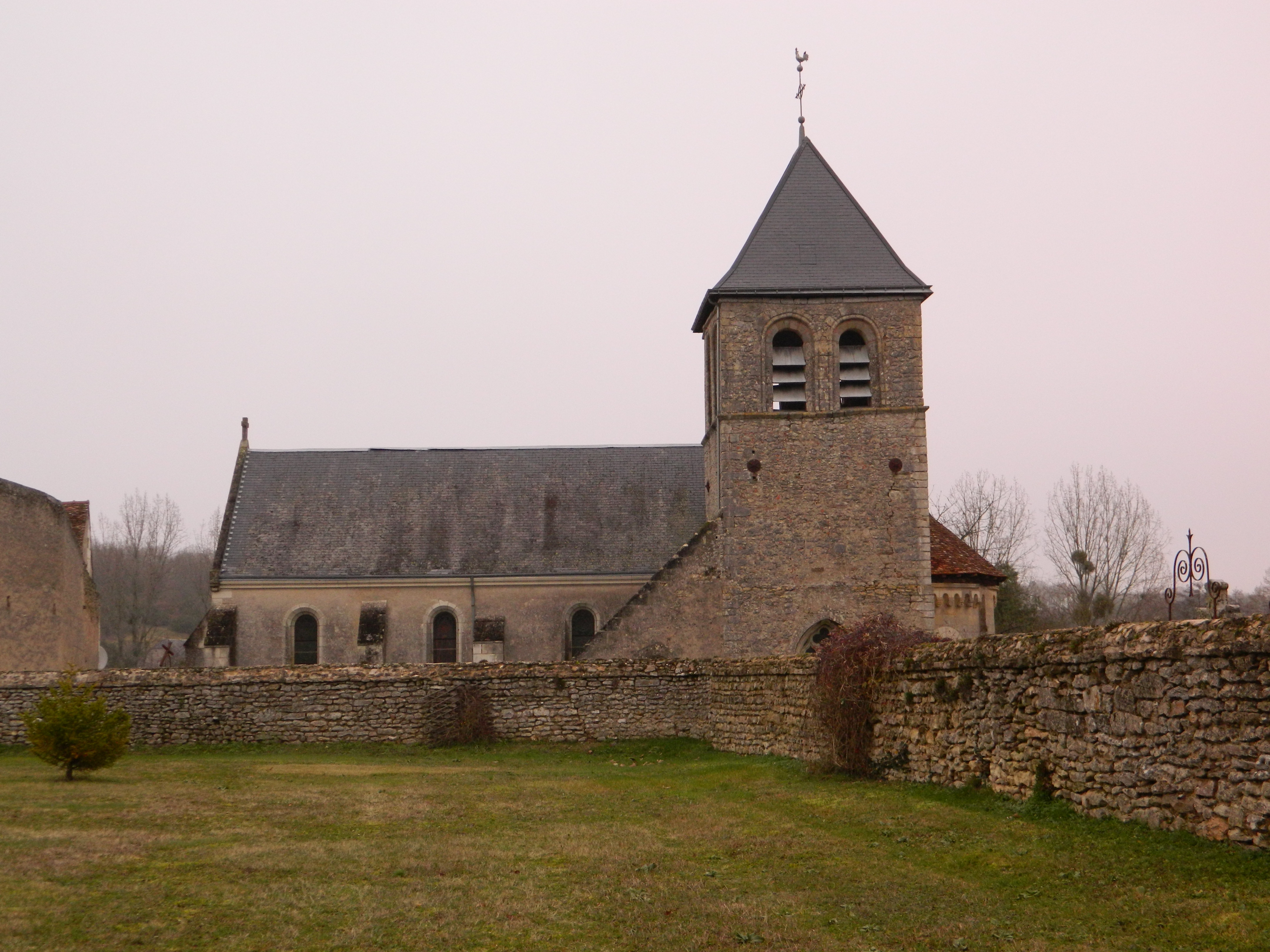 Église paroissiale Saint-Vincent de Chemillé-sur-Indrois .